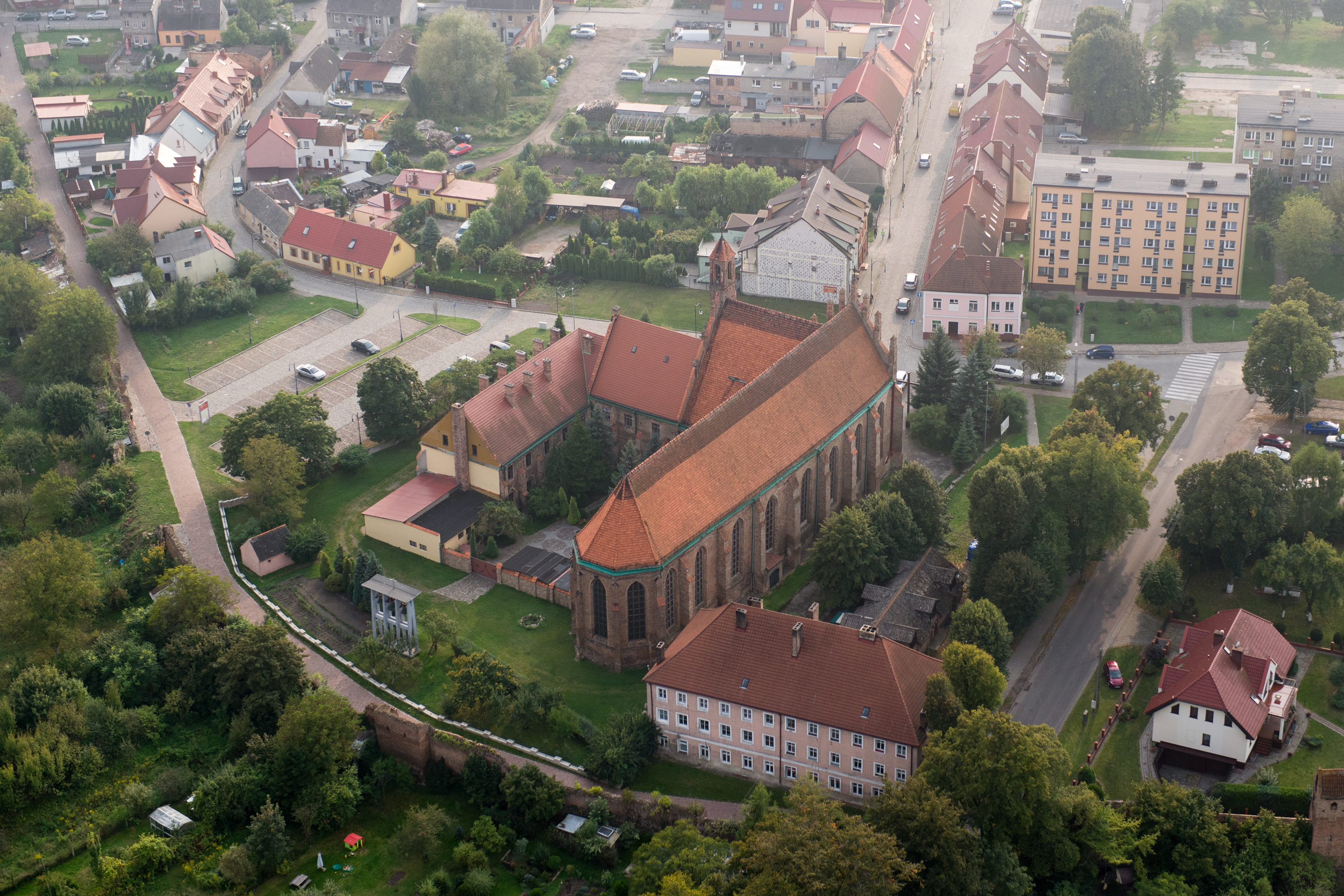 Chojna, zespół klasztorny augustianów